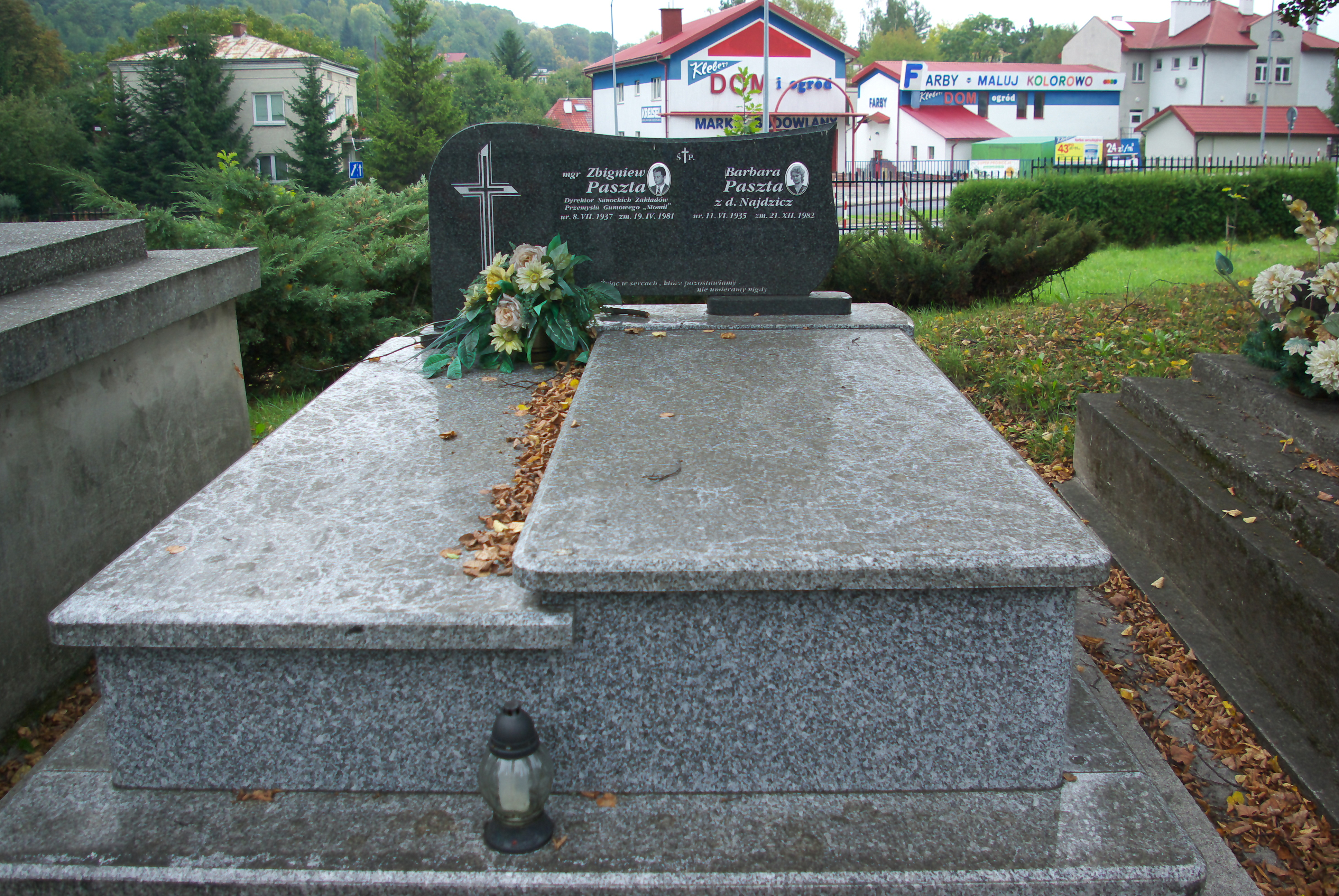 Grobowiec Barbary i Zbigniewa Paszta na Cmentarzu Centralnym w Sanoku.